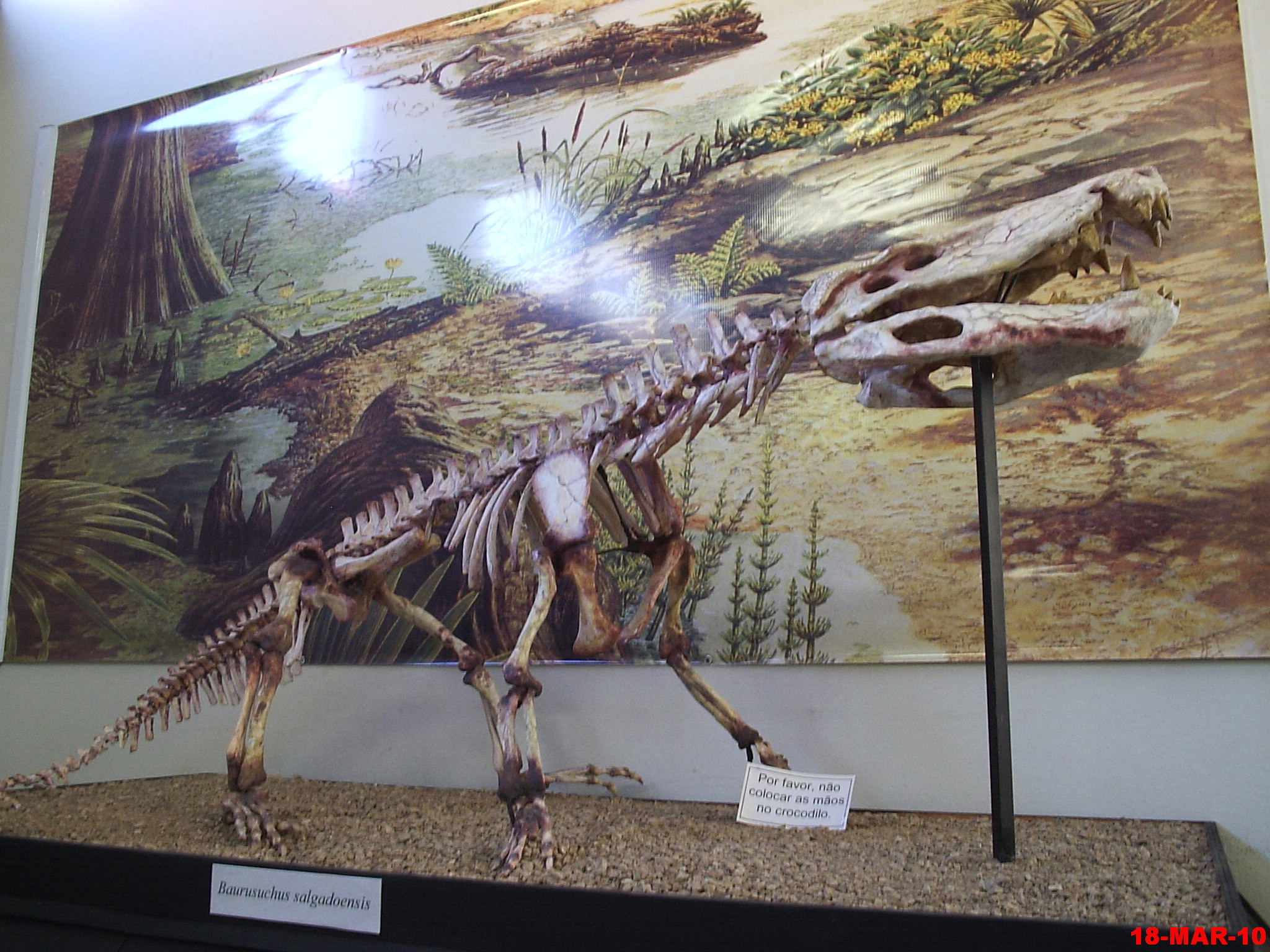 Baurusuchus salgadoensis - Crocodilo Pré-Histórico - 3 Metros - 400 Kgs - +- 90 Milhões de Anos